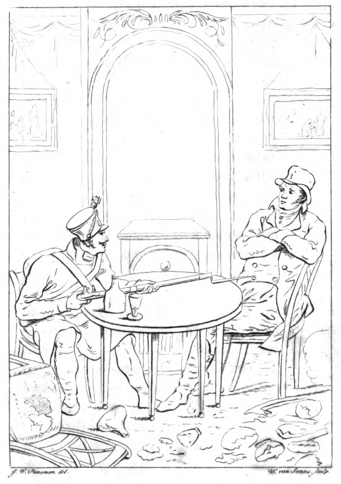 Afbeelding uit boek Woerden Slagtmaand MDCCCXIII van Jan Meulman (1814), Tekenaar Jan Willem Pieneman, Graveur Willem van Senus